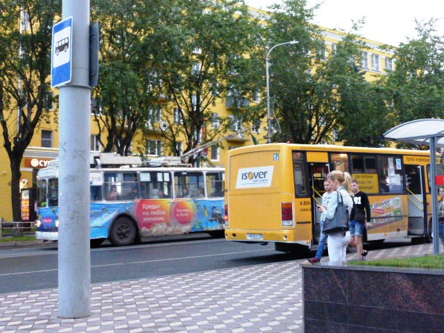 Общественный транспорт в Петрозаводске